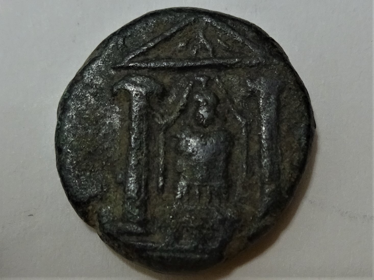 Kultstatue der Artemis von Perge auf Bronzemünze aus Perge, nach 190 v. Chr., Szaivert/Sear 5535 Avers